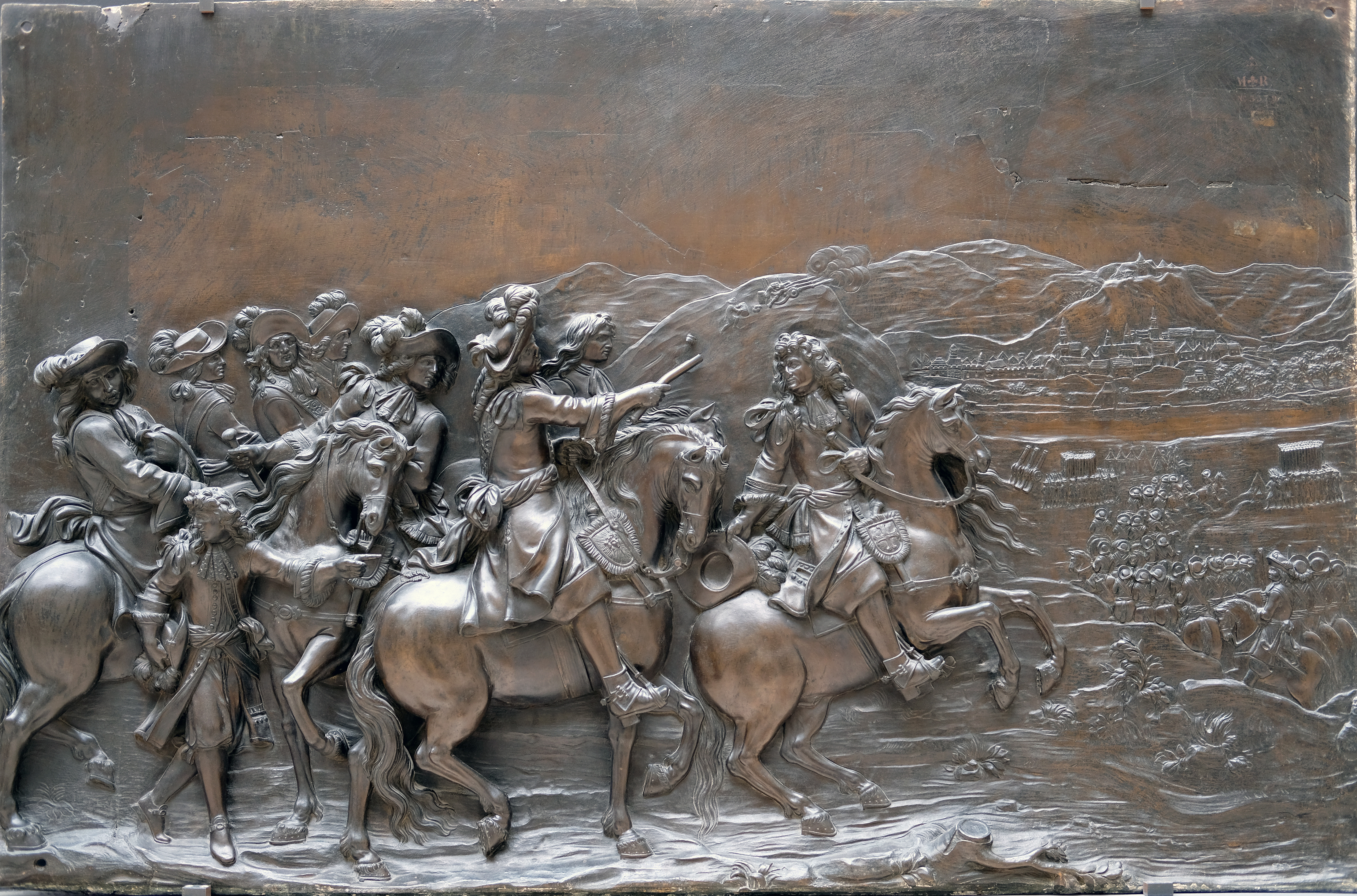 Bas-relief en bronze provenant du piédestal de la statue en bronze de Louis XIV, place des Victoires (Paris). Le roi et Vauban organisèrent la conquête de la France-Comté en mai-juin 1674, ici représentée par la prise de Besançon.